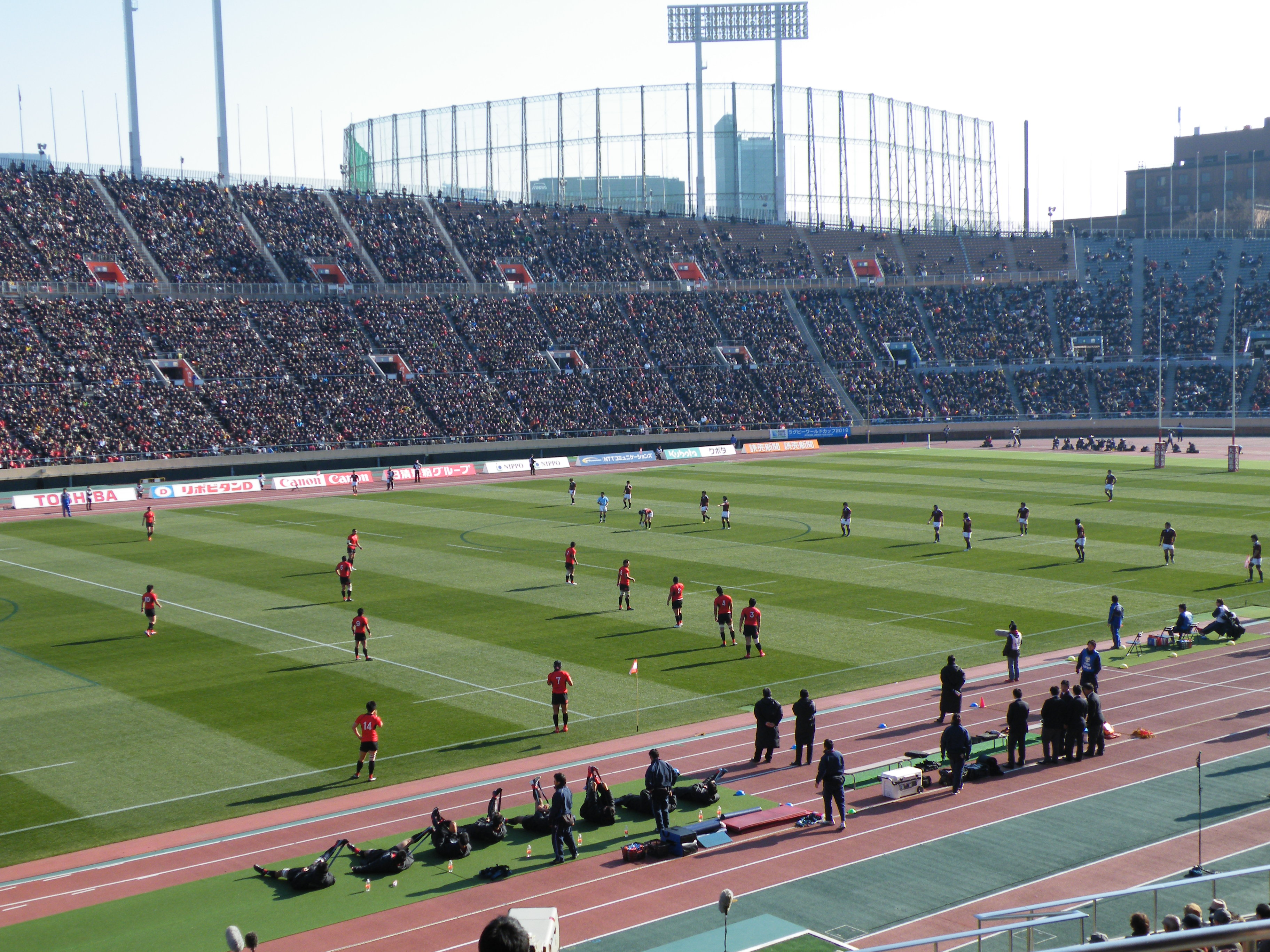 第50回全国大学ラグビーフットボール選手権大会決勝戦の様子